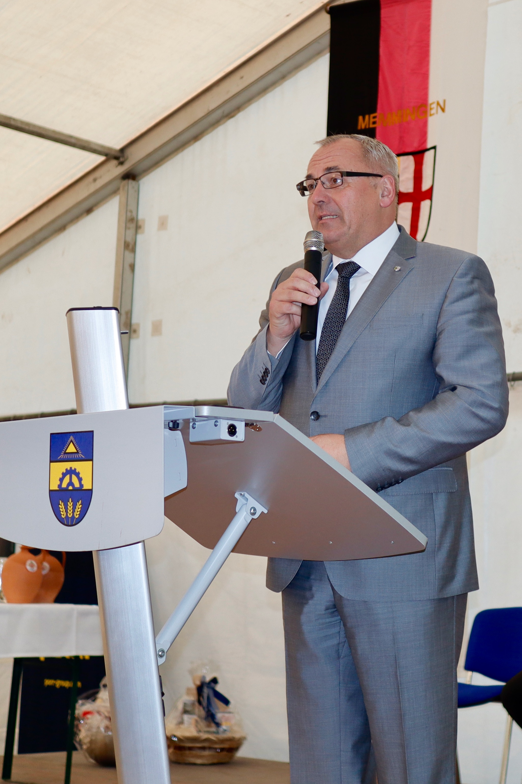 Oberbürgermeister Manfred Schilder hält eine Rede beim Festakt der Städtepartnerschaften in Litzelsdorf, Österreich